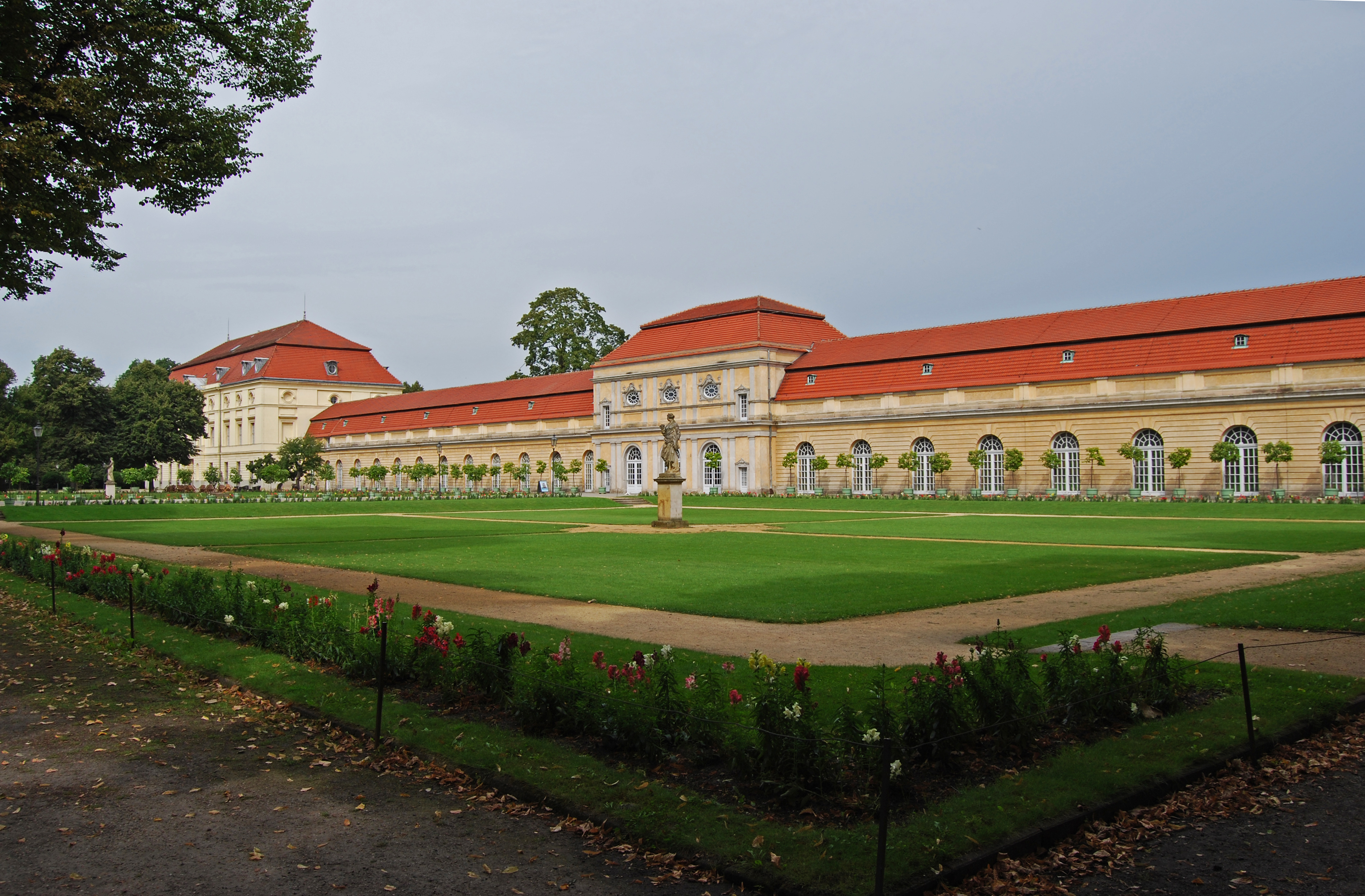 Charlottenburg Palace